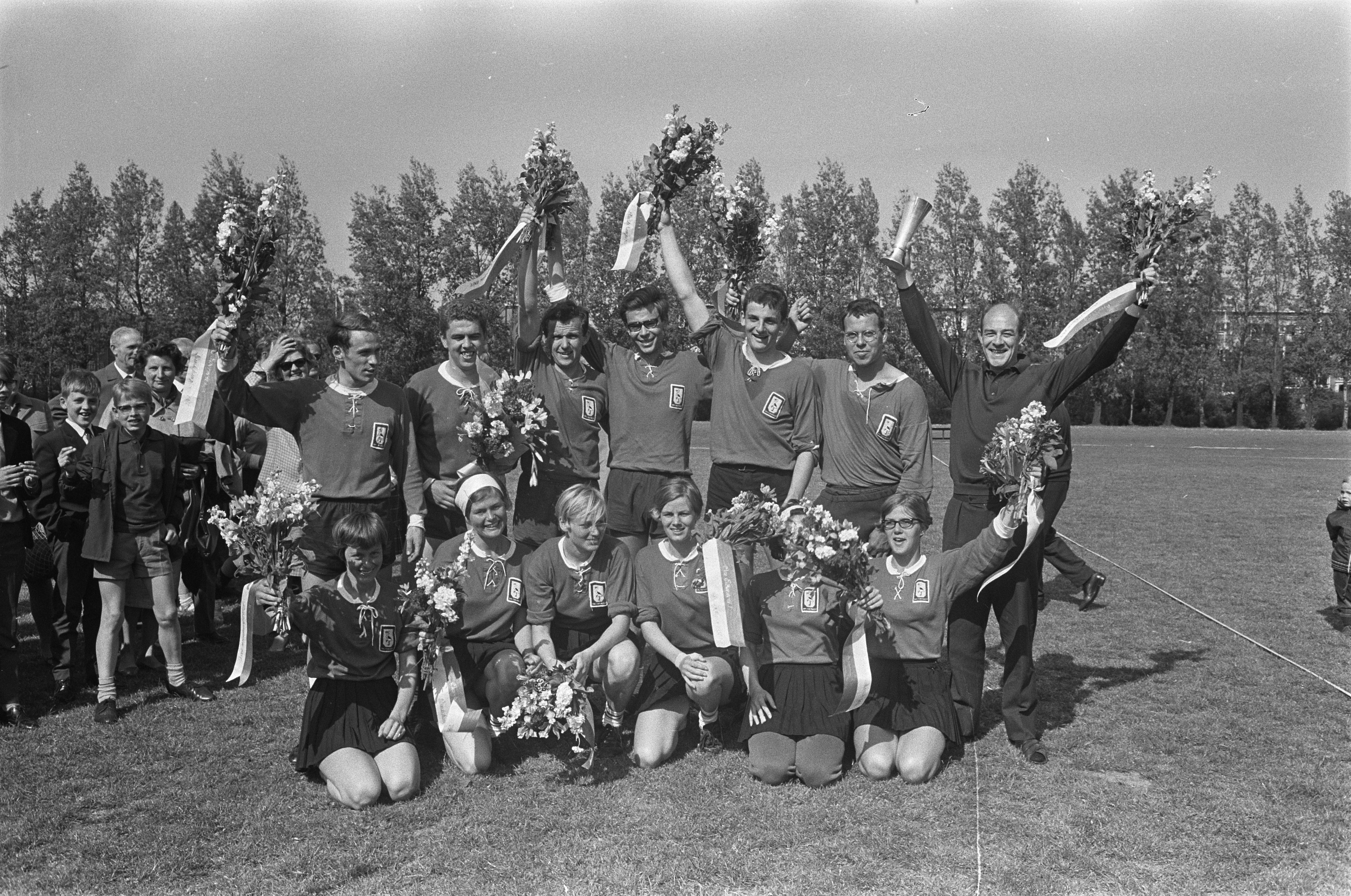 Collectie / Archief : Fotocollectie Anefo Reportage / Serie : [ onbekend ] Beschrijving : Korfbal, Ons Eibernest kampioen van Nederland, het winnend twaalftal Datum : 21 mei 1967 Trefwoorden : KORFBAL, kampioenen Fotograaf : Koch, Eric / Anefo Auteursrechthebbende : Nationaal Archief Materiaalsoort : Negatief (zwart/wit) Nummer archiefinventaris : bekijk toegang 2.24.01.05 Bestanddeelnummer : 920-3333